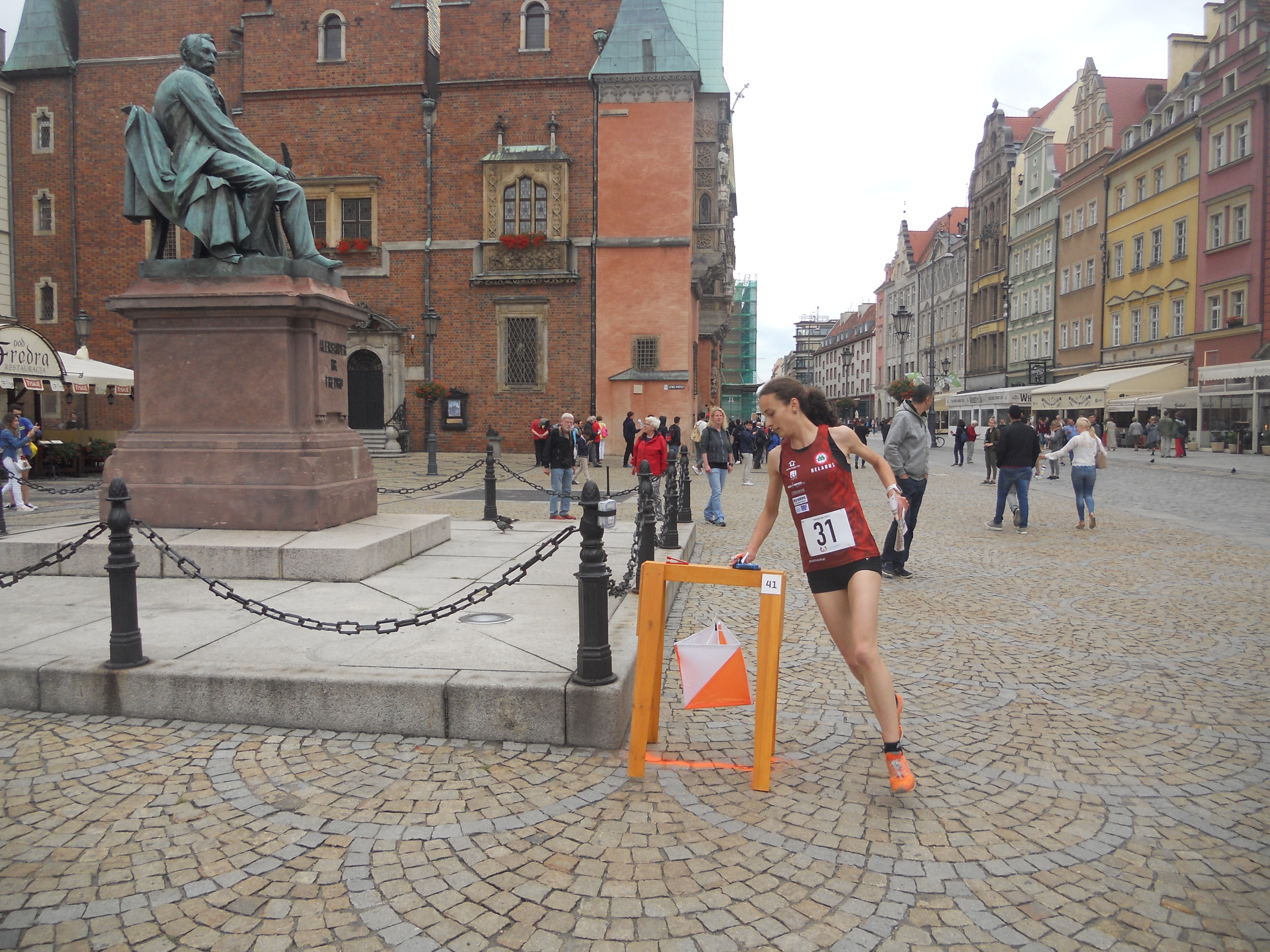 Сусветныя гульні 2017 - Арыентаванне Спрынт - Анастасія Дзянісава